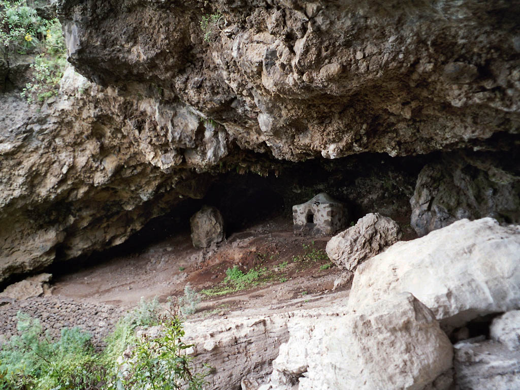 Cueva de Belmaco, cave